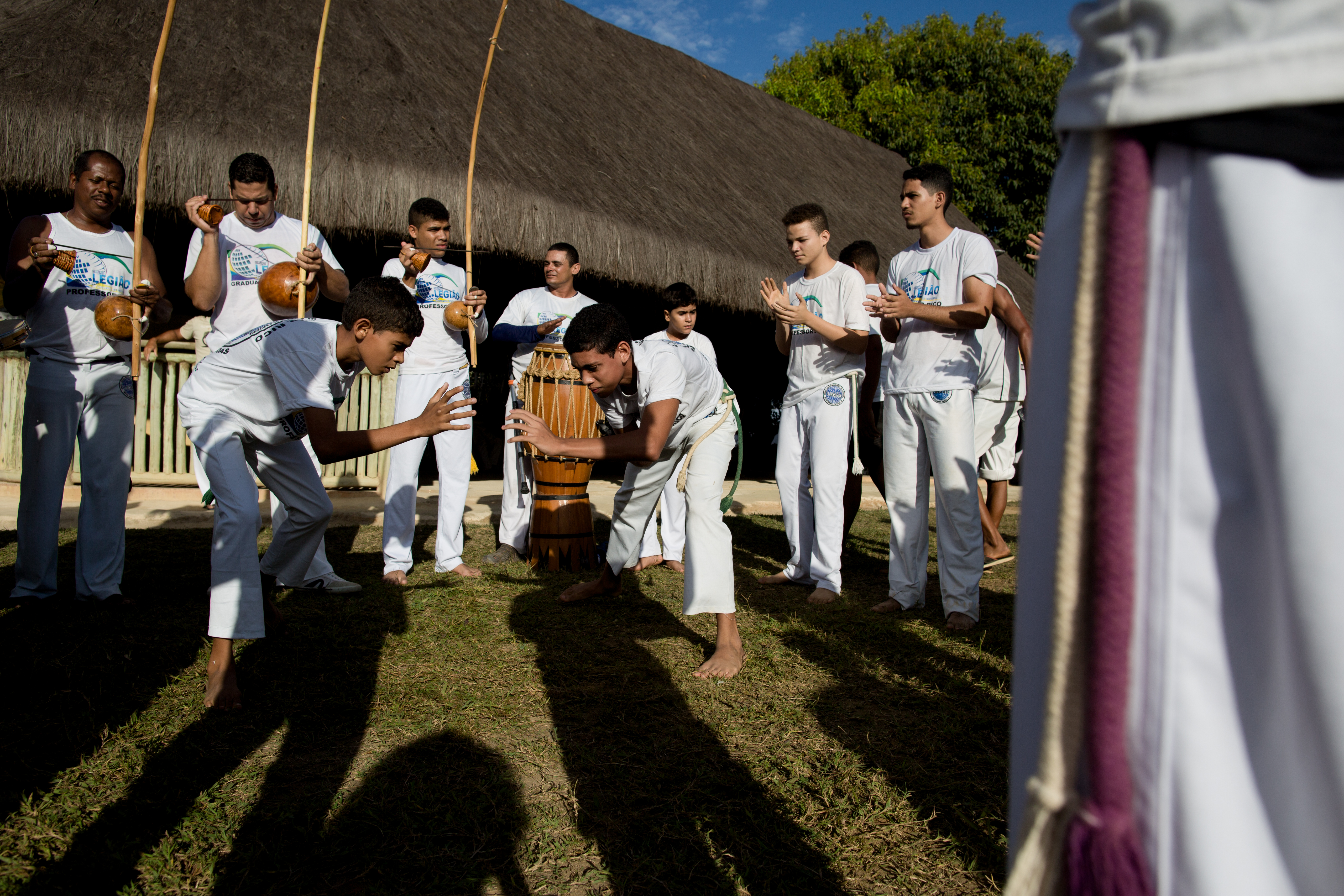 Capoeira no Parque Memorial Quilombo dos Palmares - União dos Palmares, Alagoas, Brasil